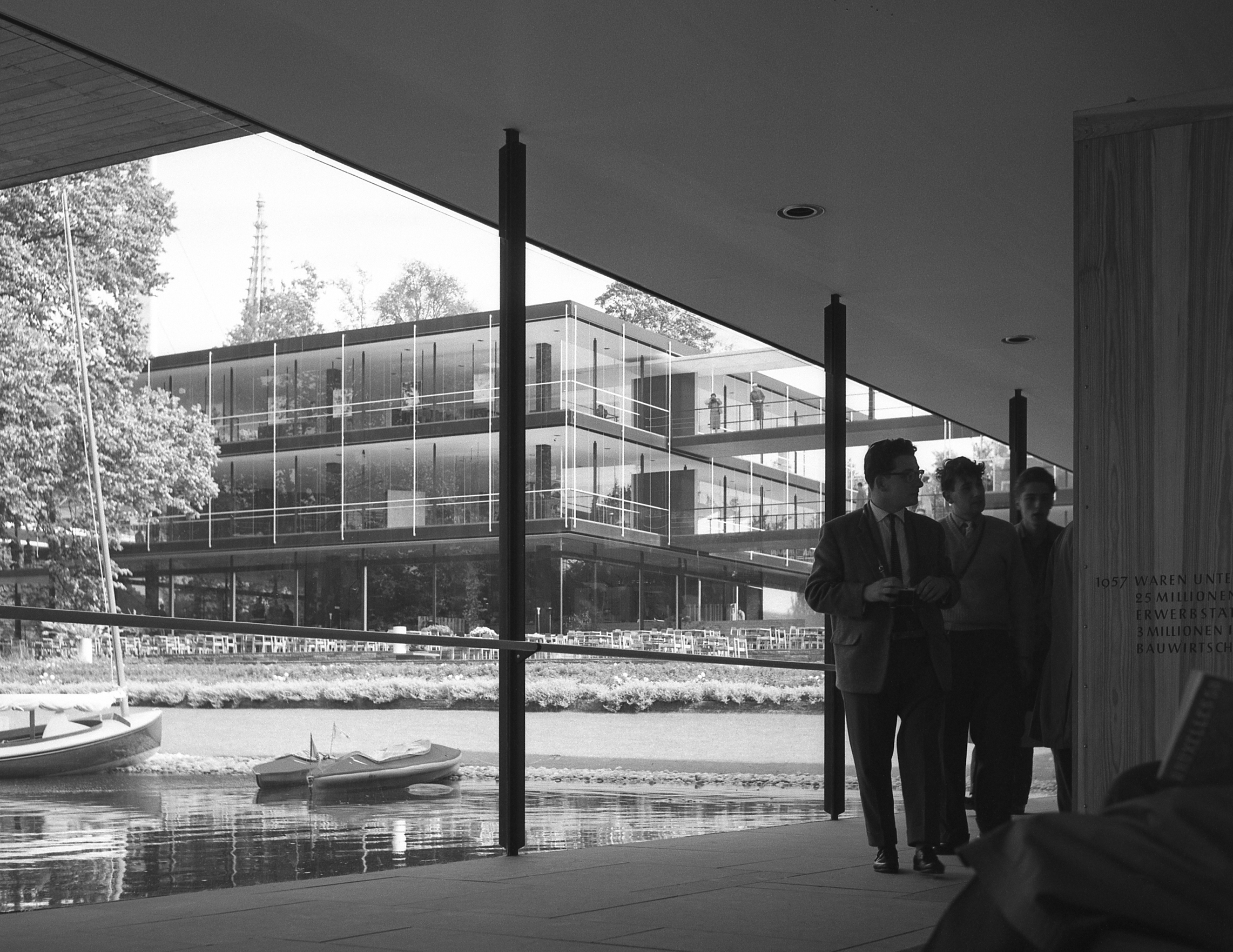 Deutscher Pavillon der Expo 1958, Brüssel.